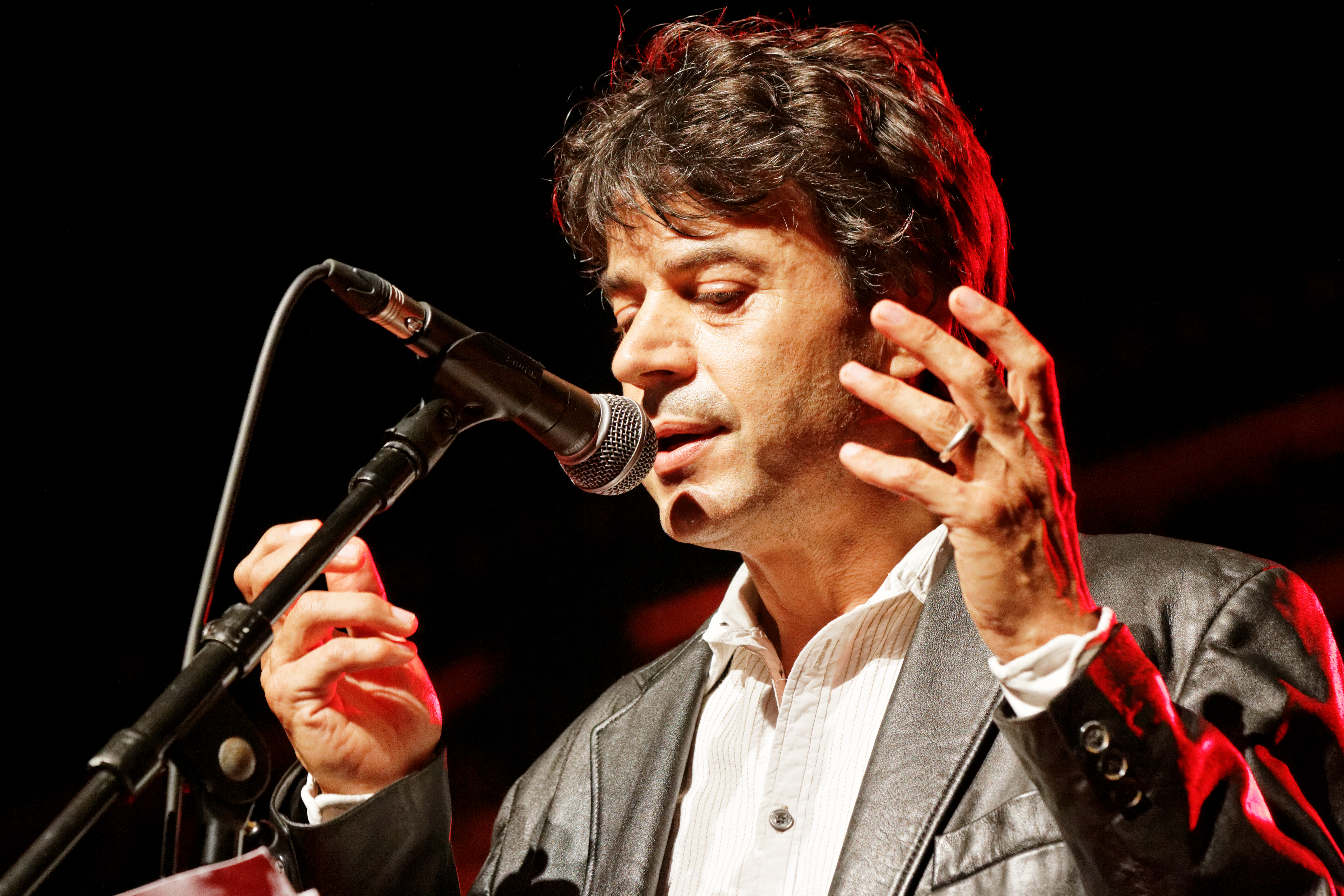 Denez Prigent en concert sur la scène Gradlon lors du festival de Cornouaille 2014.